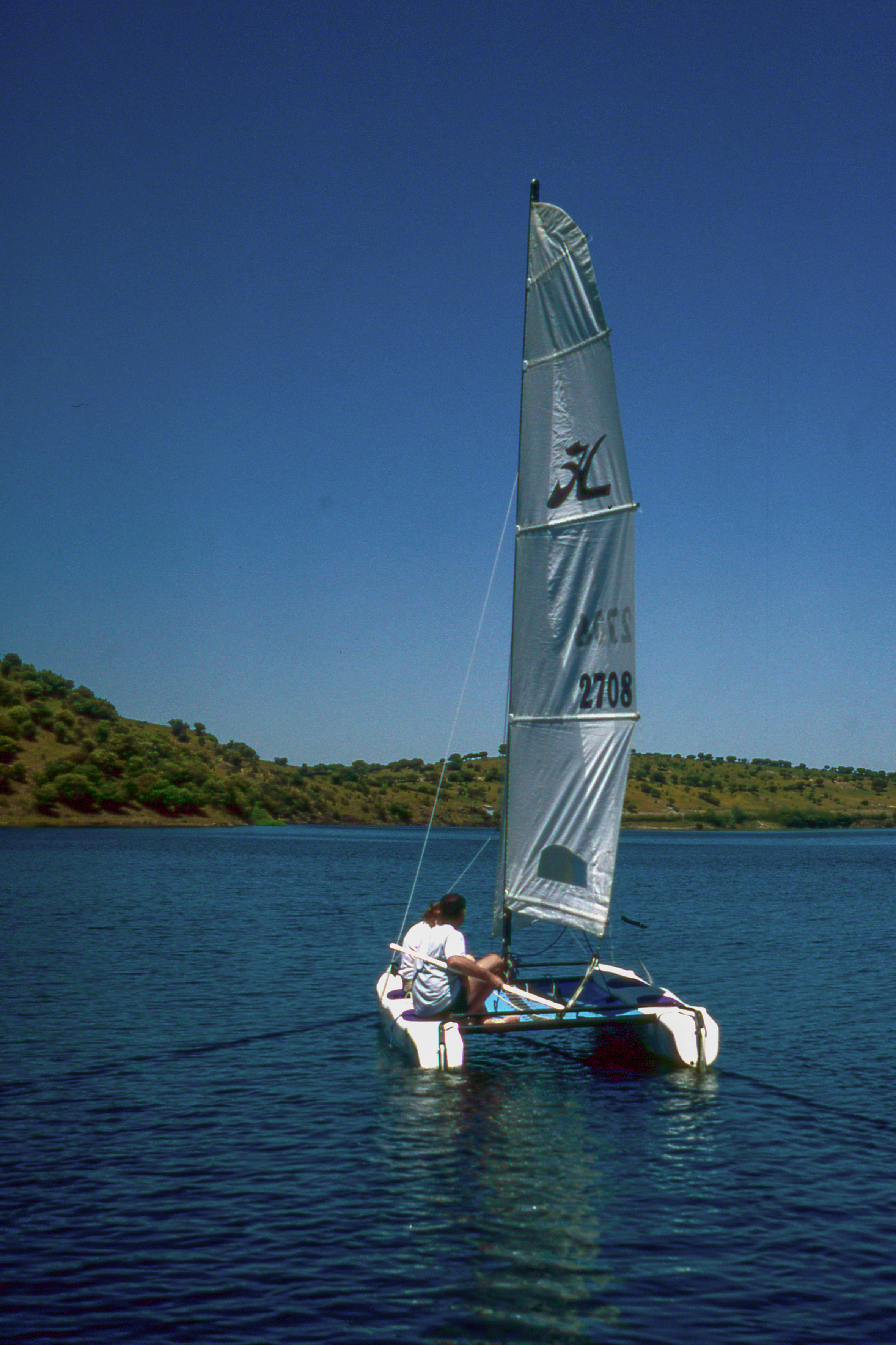 Navegando en catamarán en el embalse de Santa Teresa, Salamanca.